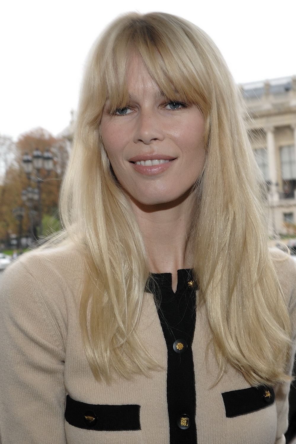 Défilé Chanel printemps/été 2010 prêt-à-porter au Grand Palais (Avenue du Général Eisenhower - Paris 75008)